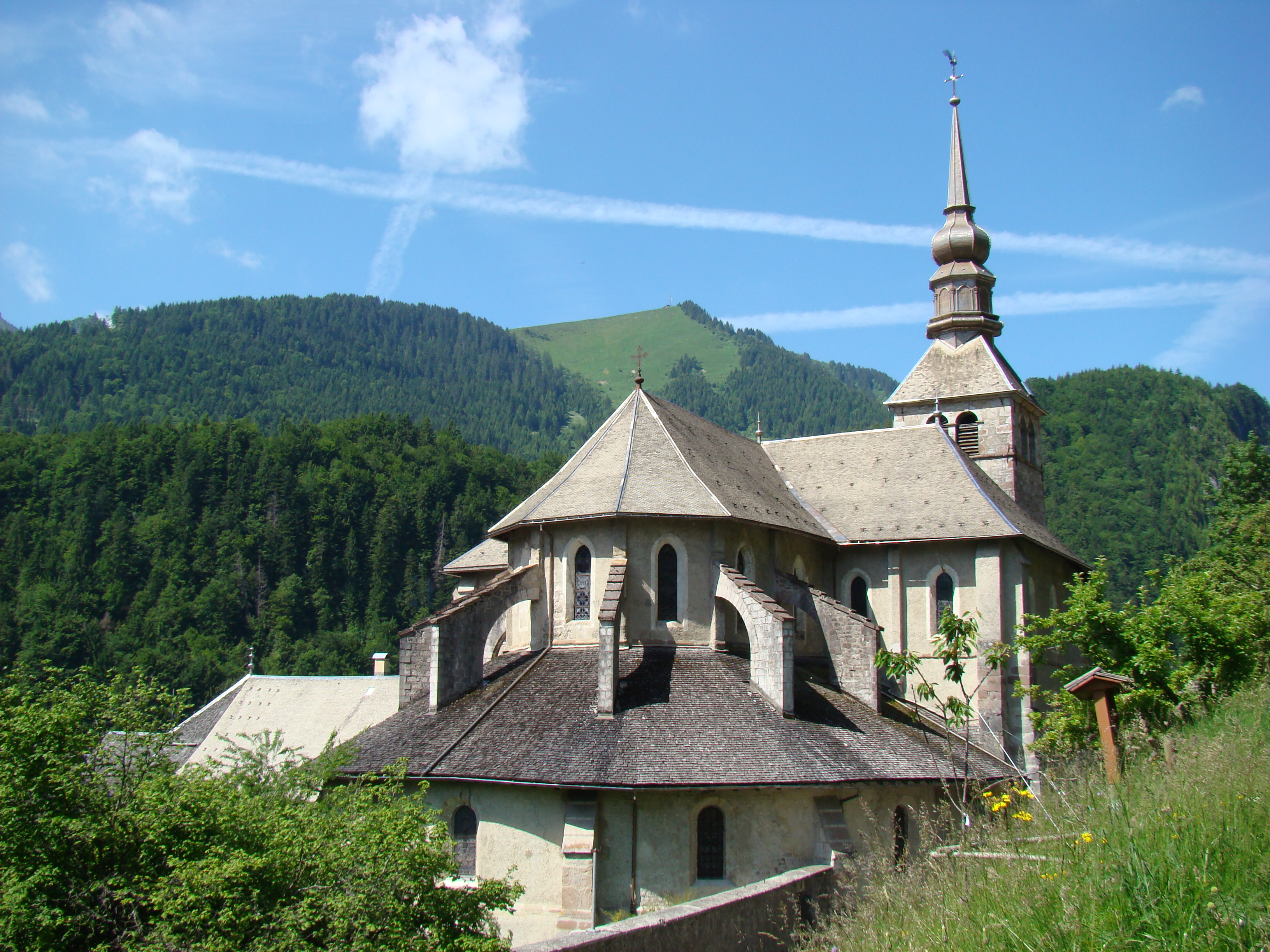 Vue du chevet de l'église abbatiale d'Abondance